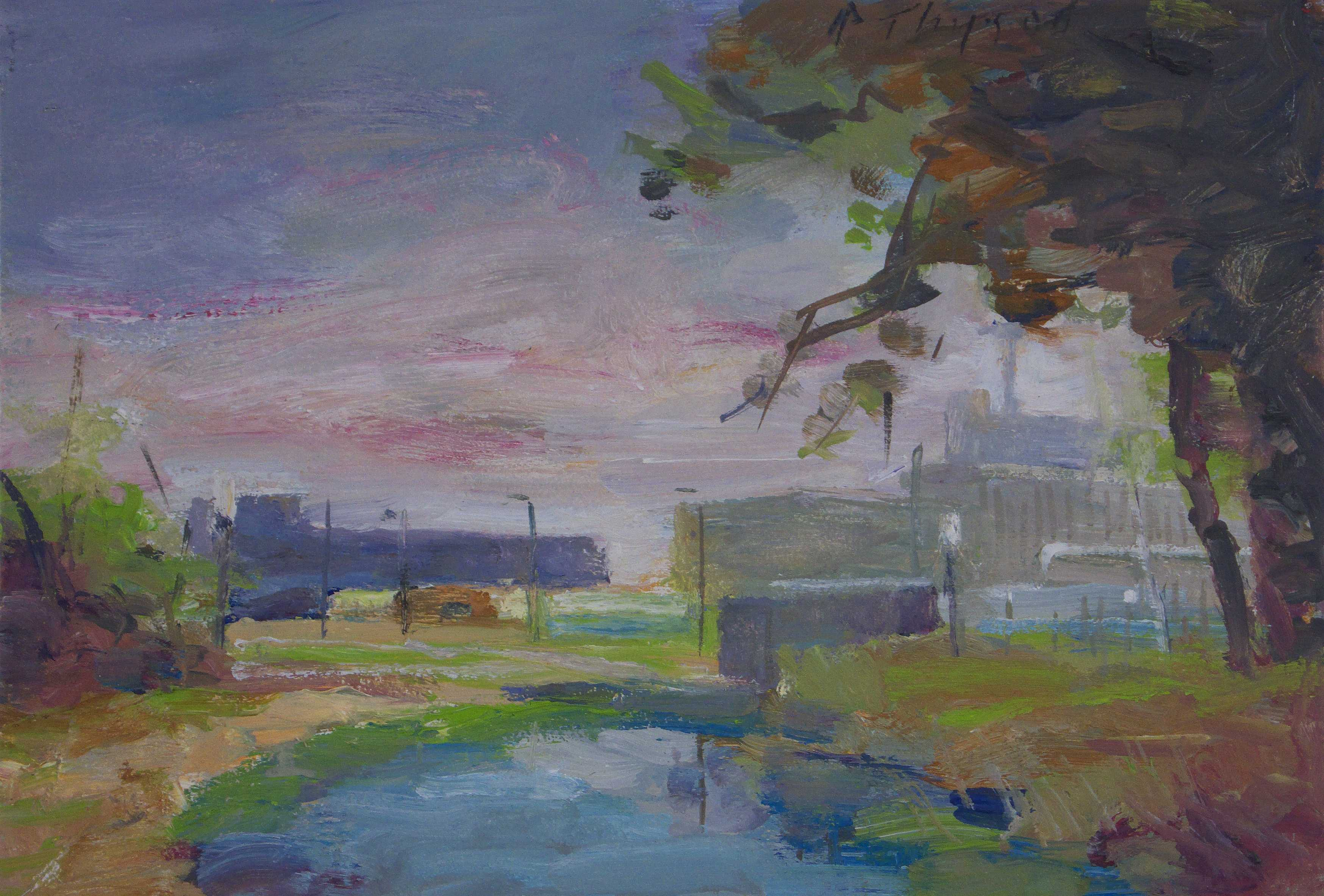 High technology campus Eindhoven